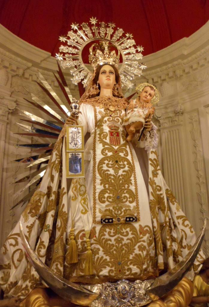 Imagen de Nuestra Señora de la Merced patrona de la ciudad de León, Nicaragua. Se encuentra en el retablo mayor del Santuario Diocesano de Nuestra de la Merced.